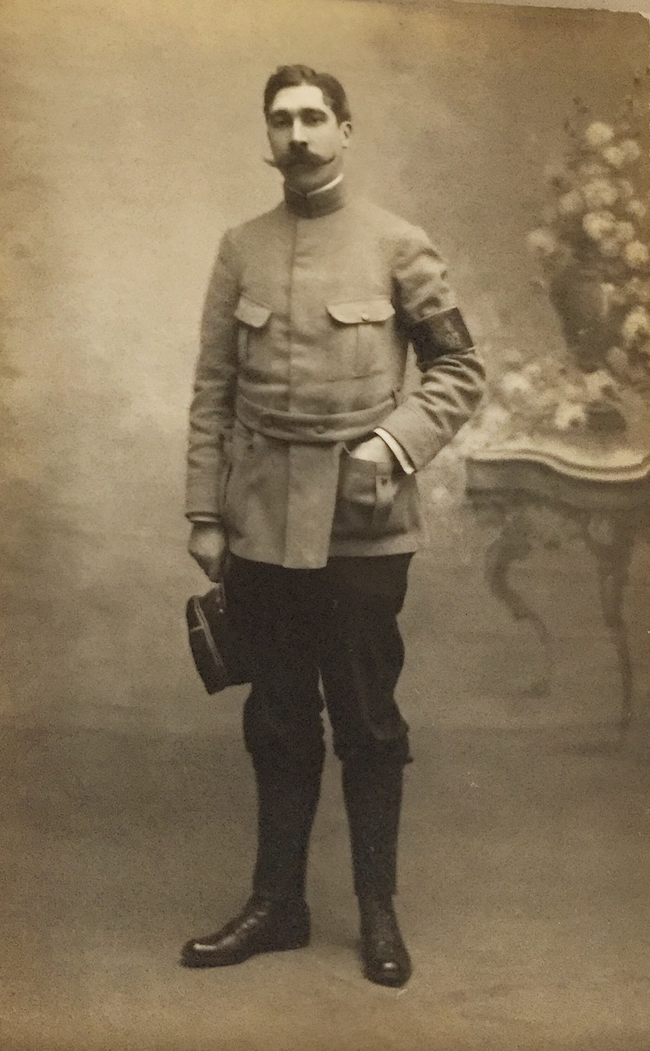 Chevalier de la Légion d'Honneur - Croix de Guerre 1914-1918